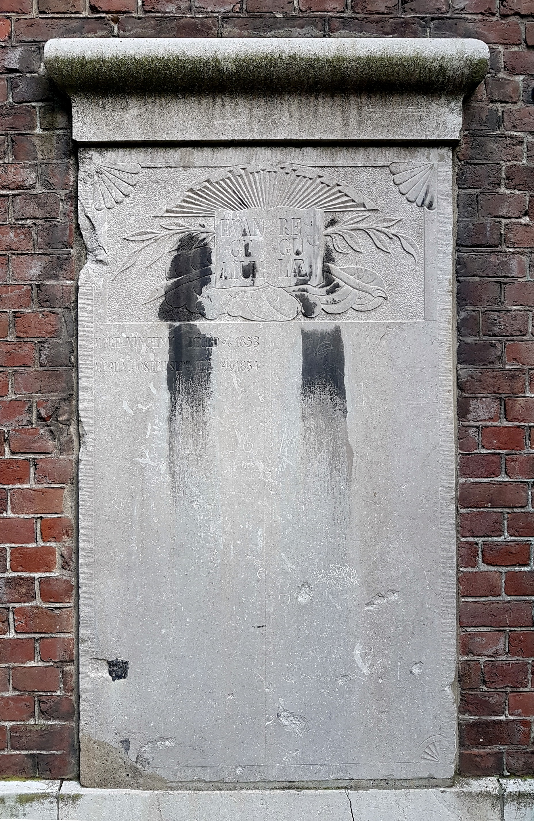 Graf- of gedenksteen van de eerste moeder-oversten van het Ursulinenklooster in Maastricht, ingemetseld in een buitenmuur van het voormalige klooster. Aan de bovenzijde een reliëf van een opengeslagen boek, omgeven door wolken, zonnestralen en gebladerte. Op de boekpagina's staat de Latijnse tekst: Evangelium Regulae (Voorschriften van het Evangelie). Daaronder is ruimte voor een groot aantal namen, waarvan er maar twee daadwerkelijk zijn aangebracht: Mère Vincent · Déced[é] 3/6 1853 en Mère M. Joseph Sup[érieu]re · 21/9 1854.